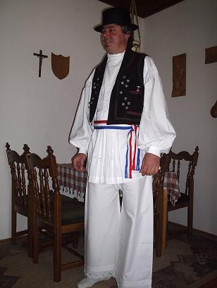 Gaće od 4-5 pola, za radne dane bez ukrasa, a u svečanije obliku oskudno ukrašene bijelom šlingom. Košulja-rubača se nosila dugo do ispod bokova ukrašena bijelom šlingom ili vezena crvenom i plavom vulom na prsima. Stegnuta u zapešću i ima ovratnik. Prosluk je crne ili tamnoplave boje, ukrašen tankim strojnim prošivima raznobojnim koncem, metalnim gumbićima, kratak do pasa, podstavljen tkaninom iznutra. Kapa je naziv za crni šešir uskog oboda dok je remen široki i kožni. Na nogama su u radne dane drvene klompe, kožnate opanke, a u svečanijim prigodama čizme.